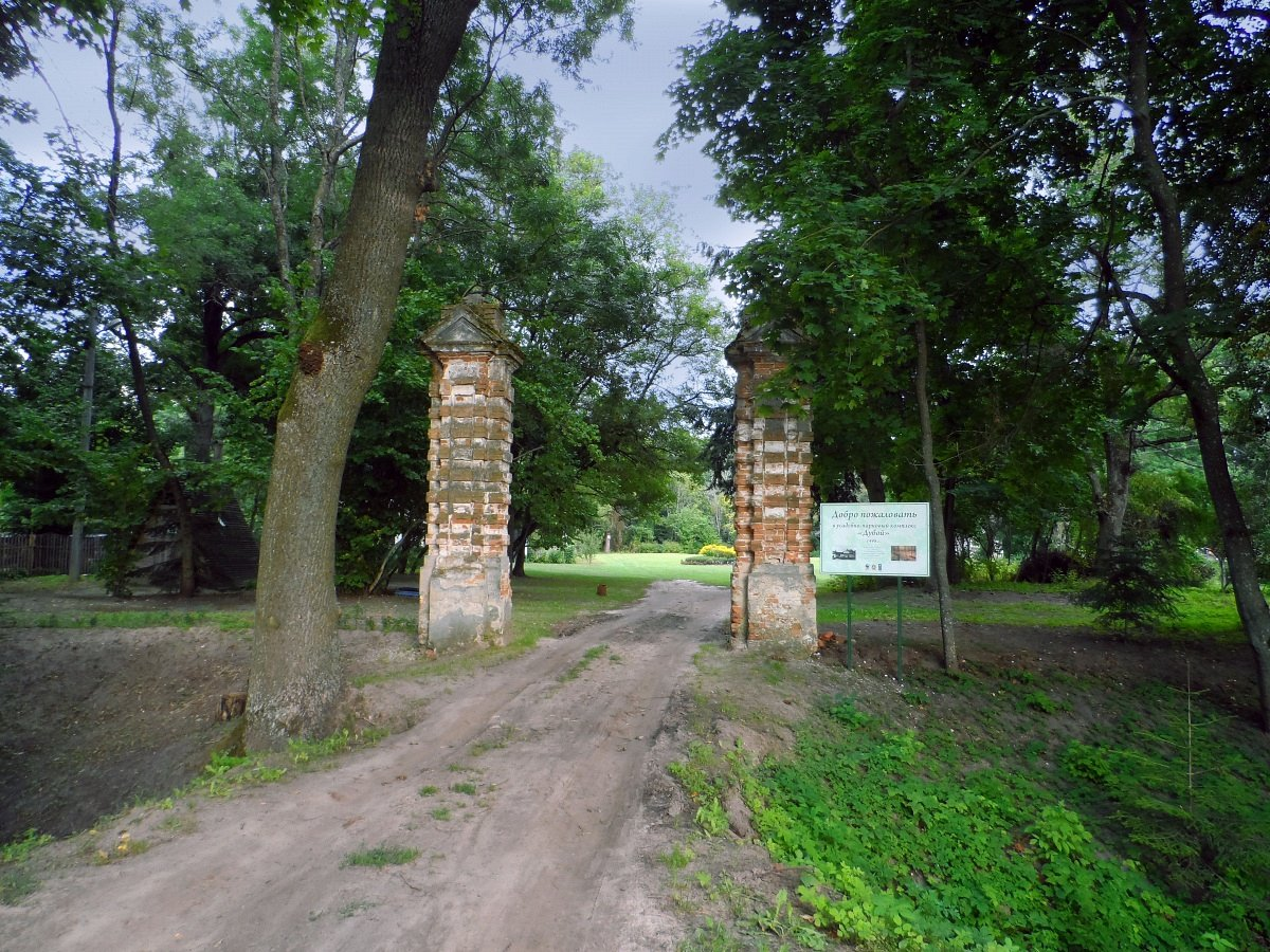 Дубае. Брама